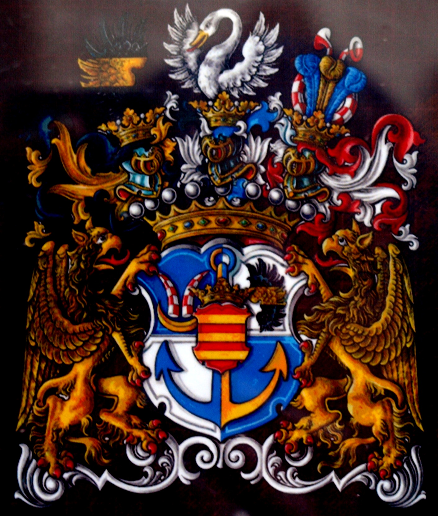 Erb rodu Nostic-Rýnek v Průhonicích